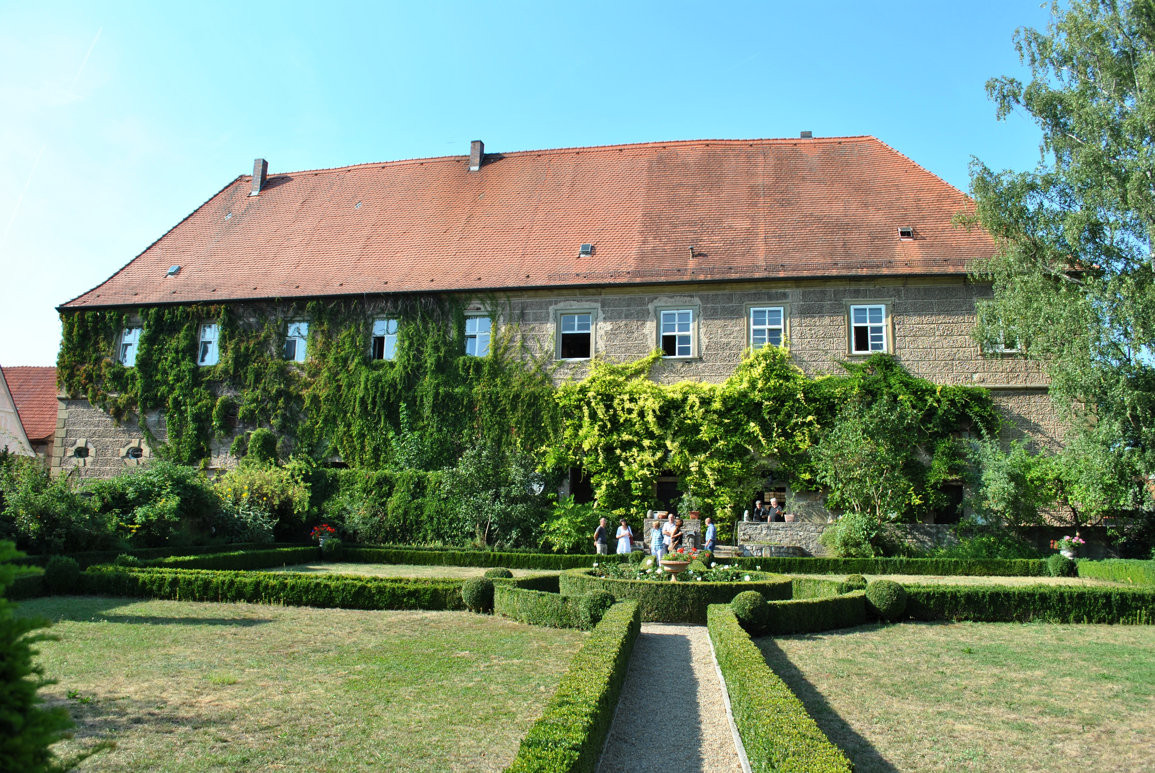 Schloss Zeilitzheim Barocke Vierflügelanlage, erbaut 1677–83 von Andreas Keßler für Graf Philipp von WolfsthalThis is a photograph of an architectural monument.